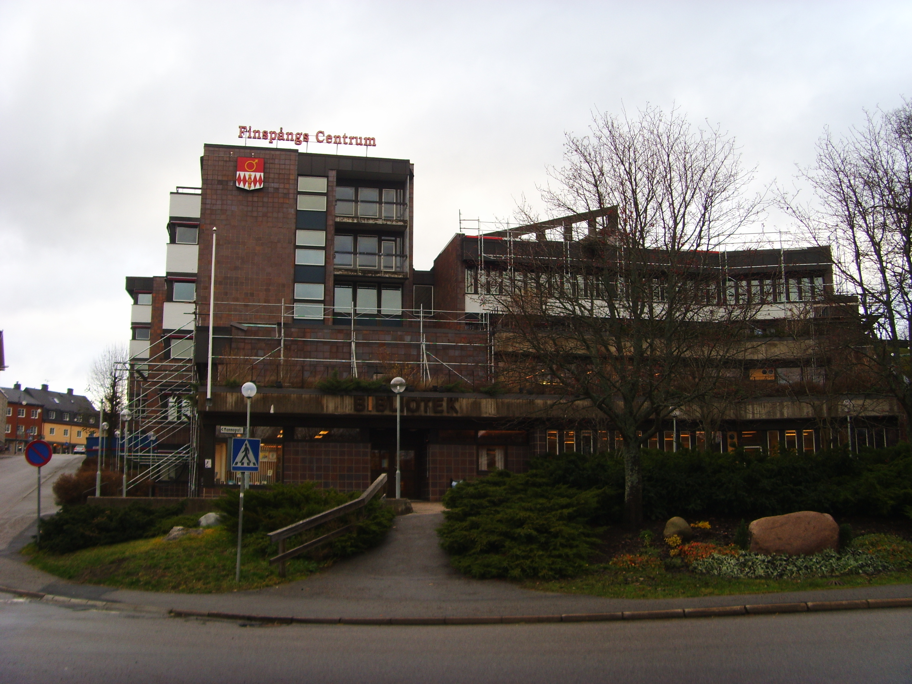 Finspångs centrum, huvudbiblioteket.